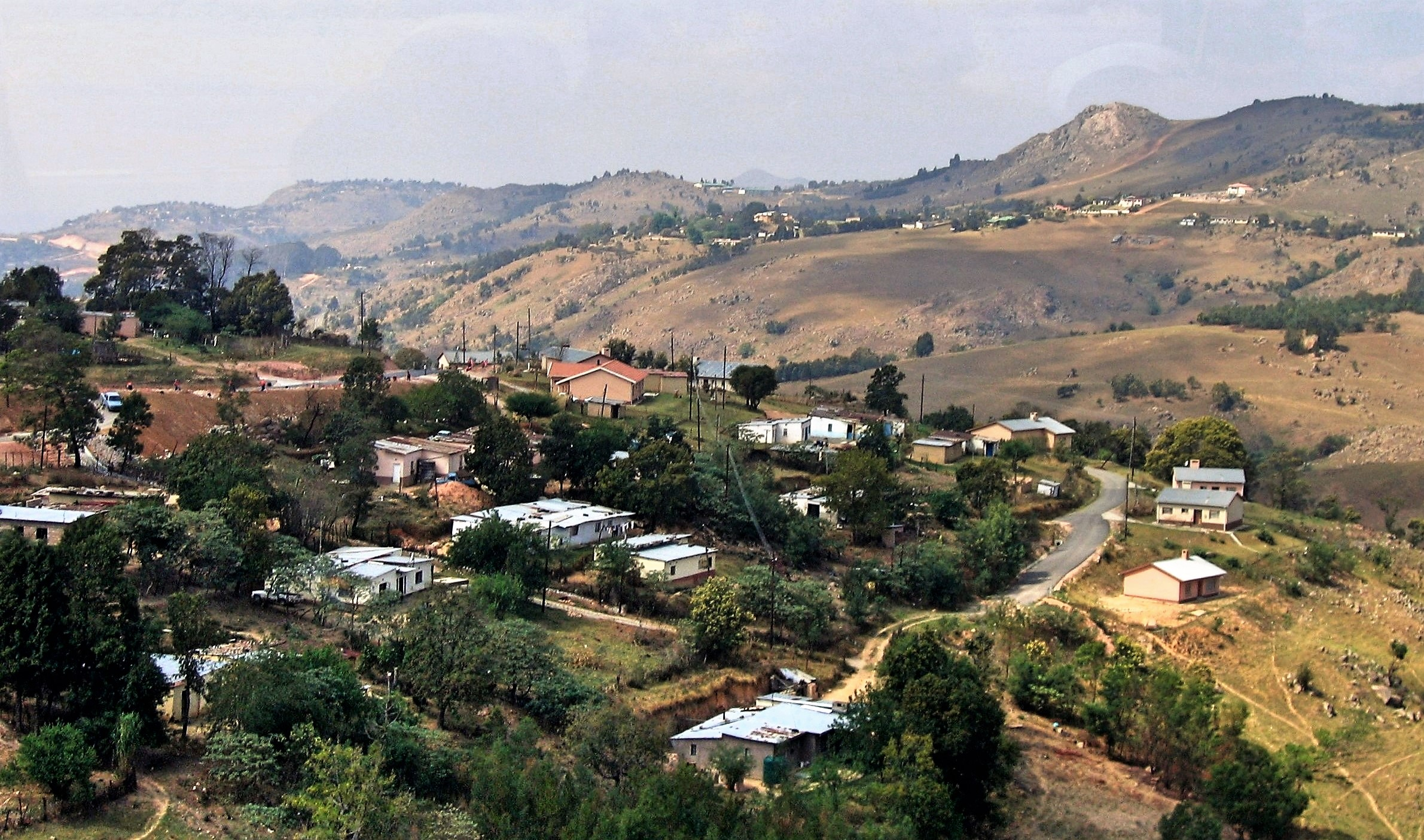 Mantenga Swaziland This is an image with the theme "Africa on the Move or Transport" from: Eswatini